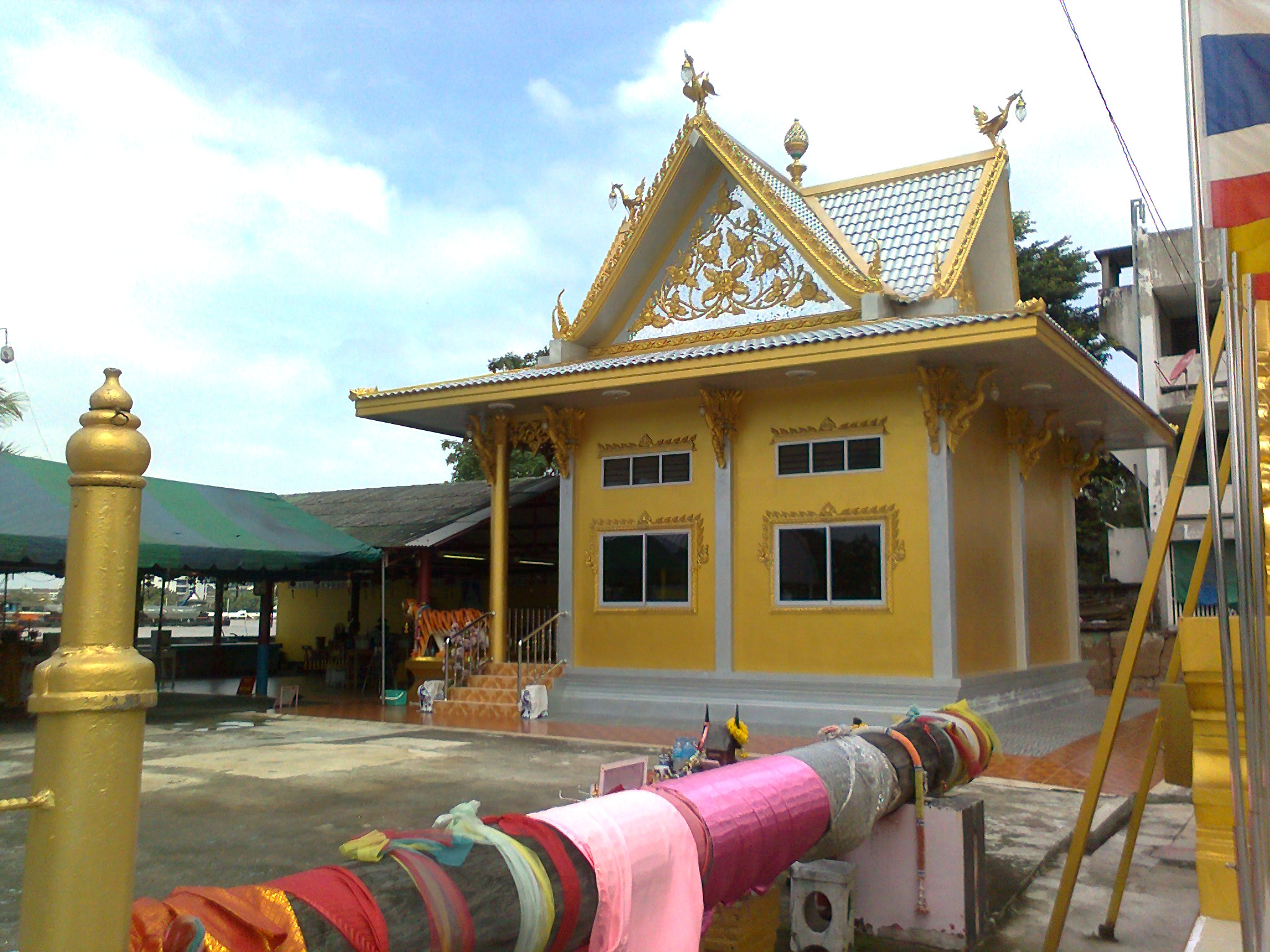 Poochaosamingprai Shrine